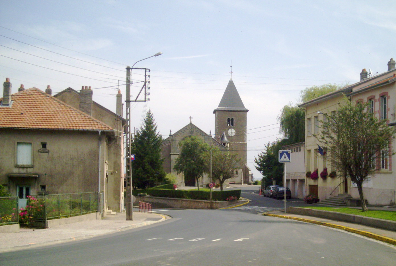 Eglise et mairie